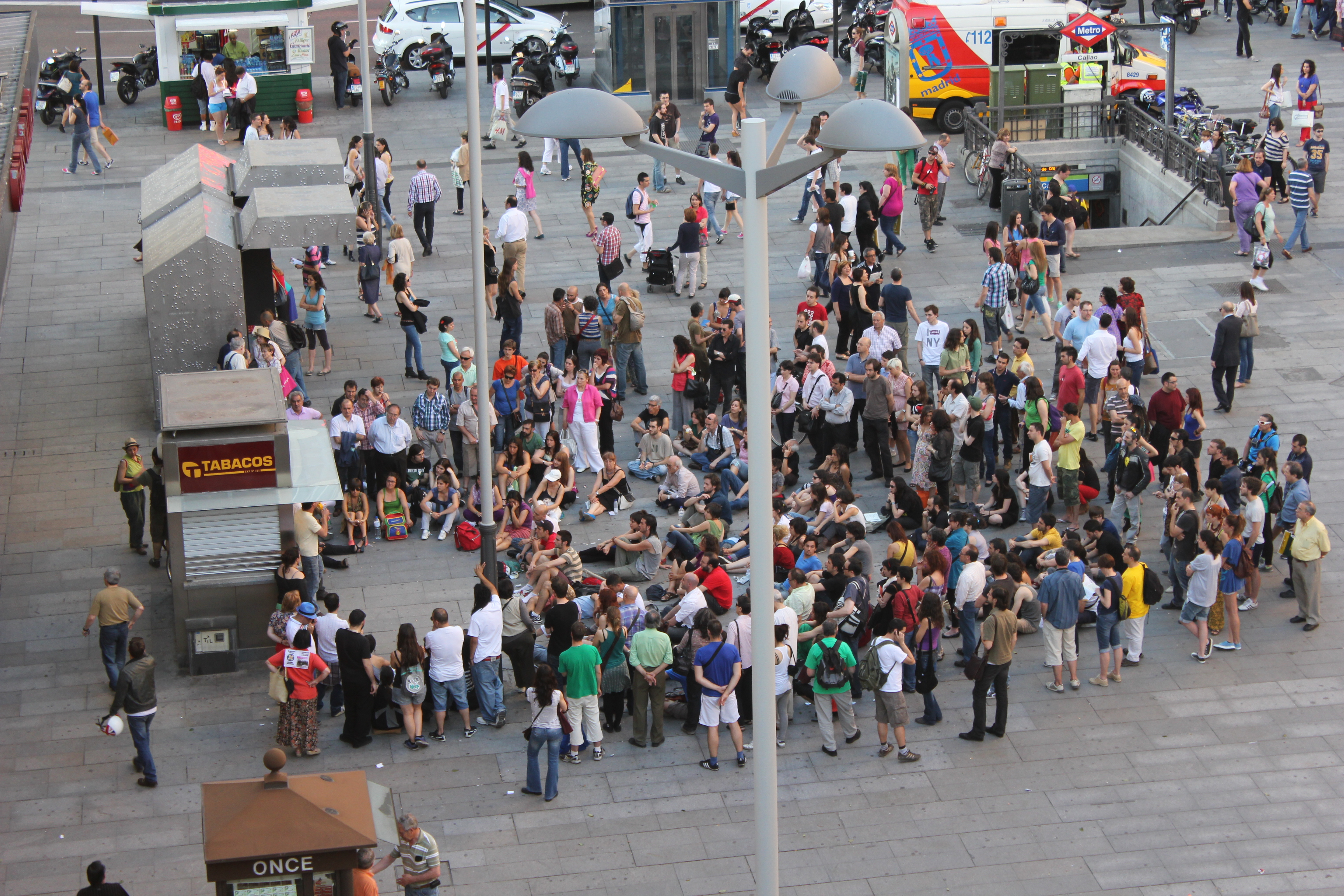 Una de las imágenes más comunes durante este año: Asamblea de Indignados en 2012.